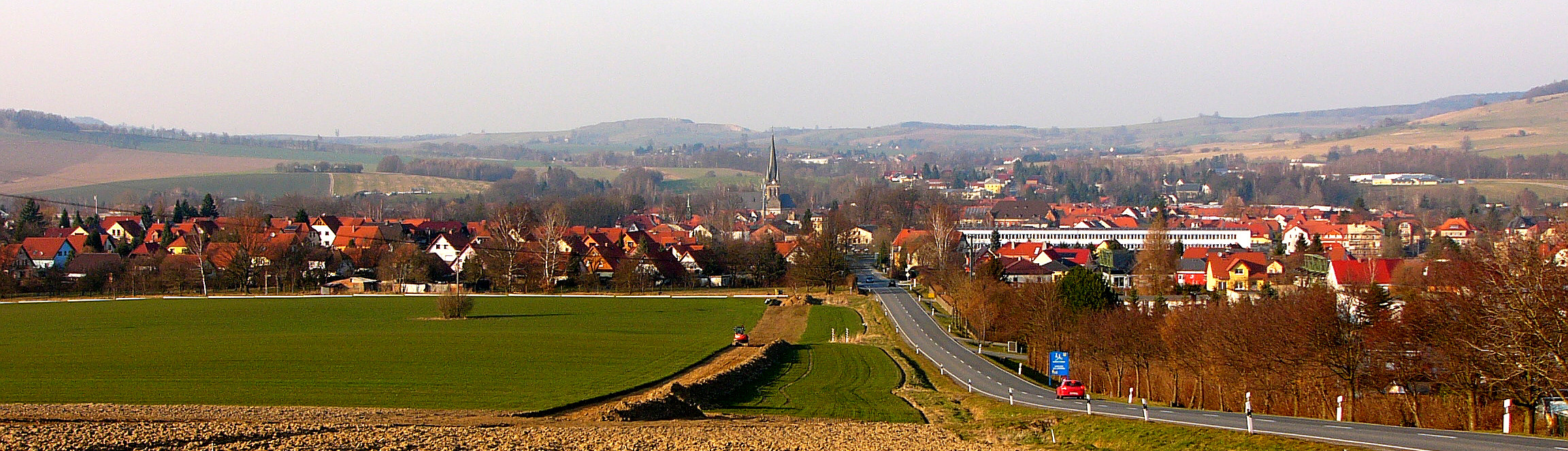 Blick auf Neustadt in Sachsen von der Götzingerhöhe